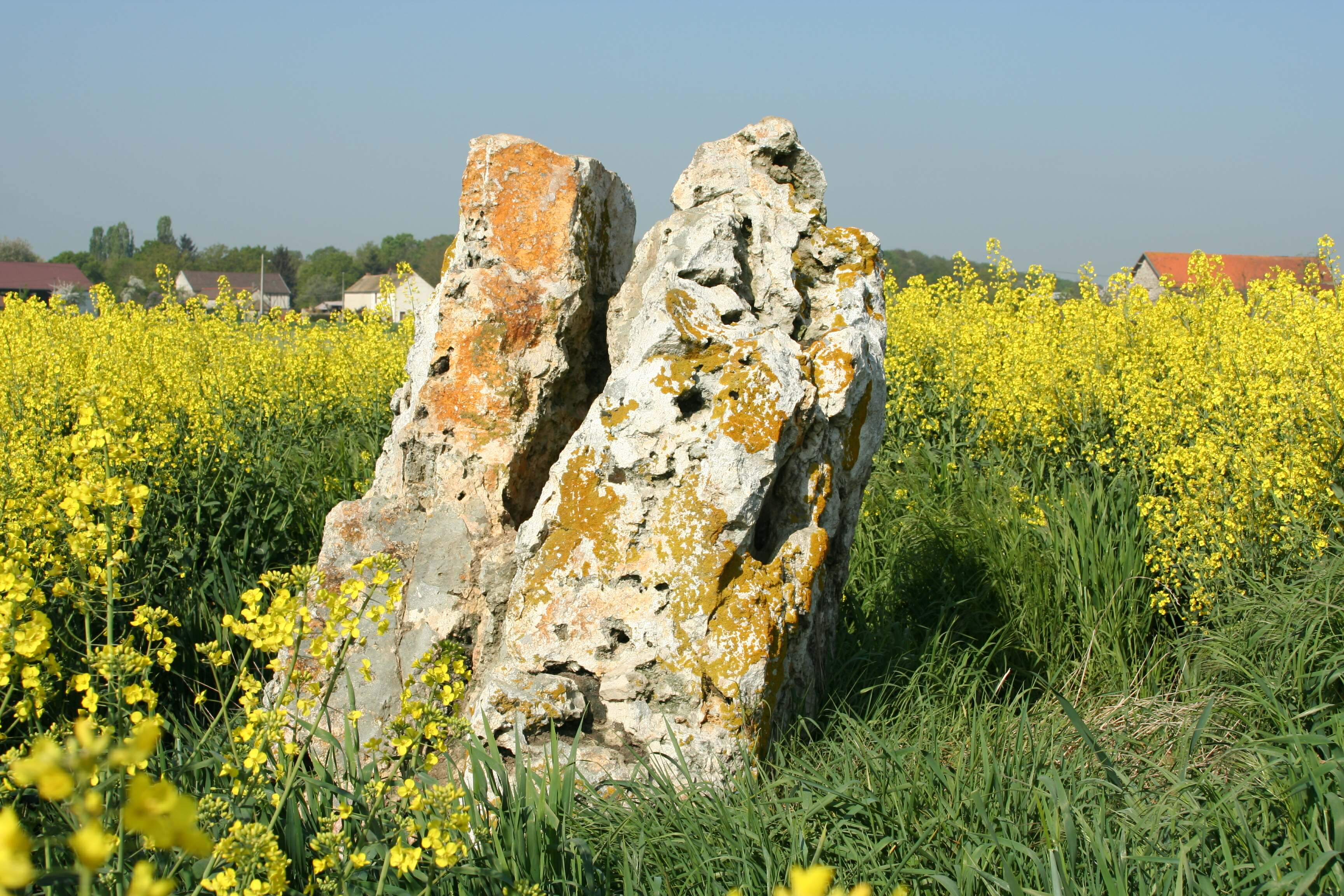 Menhir de la Pierre-Grise à Neauphlette - Yvelines (France)